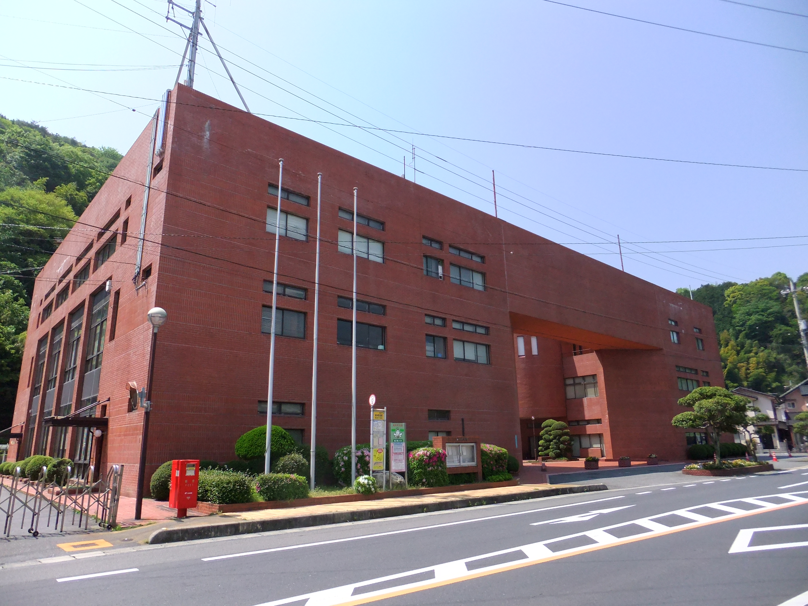 和木町役場